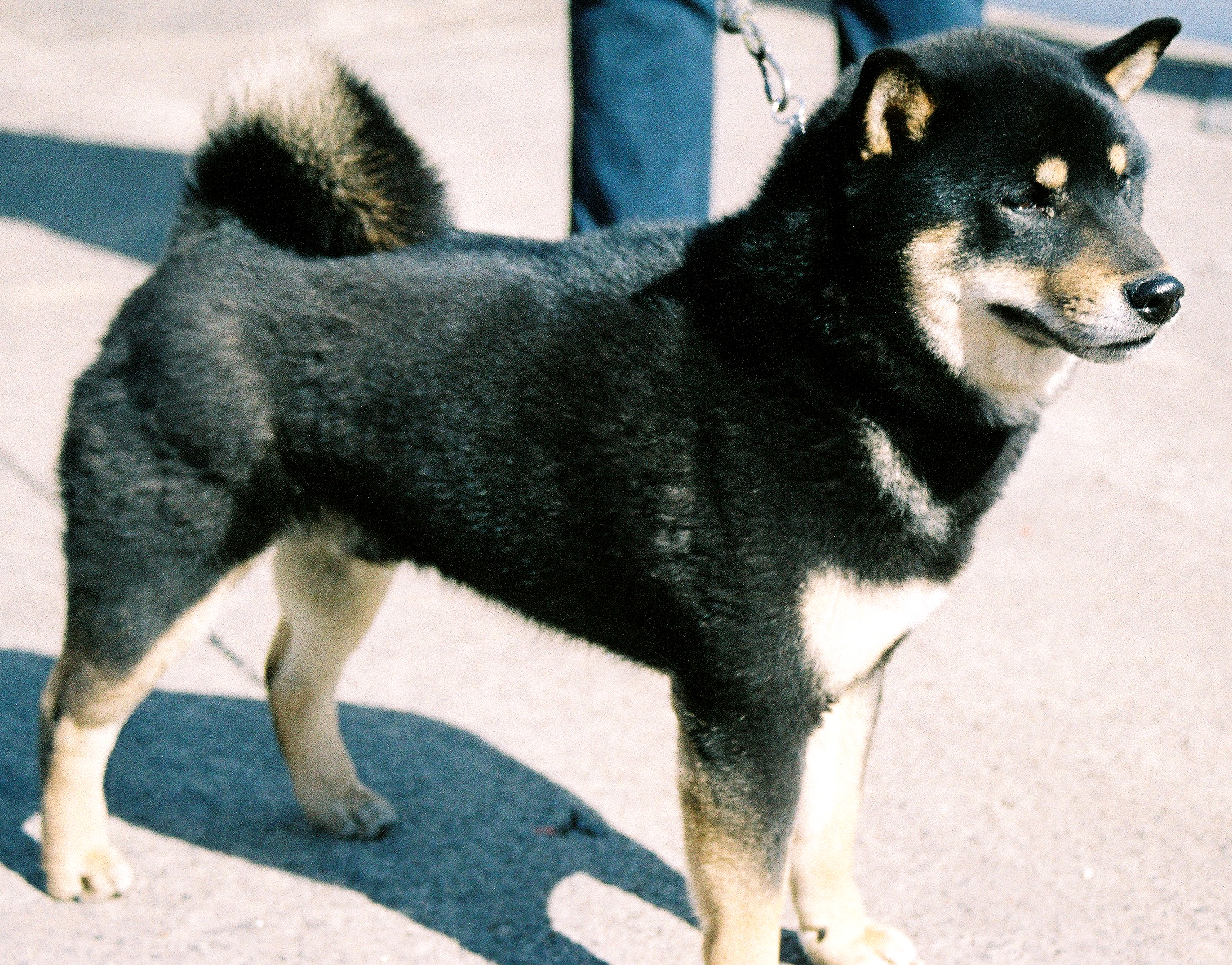 autor: Pleple2000 15:23, 5 April 2006 (UTC)